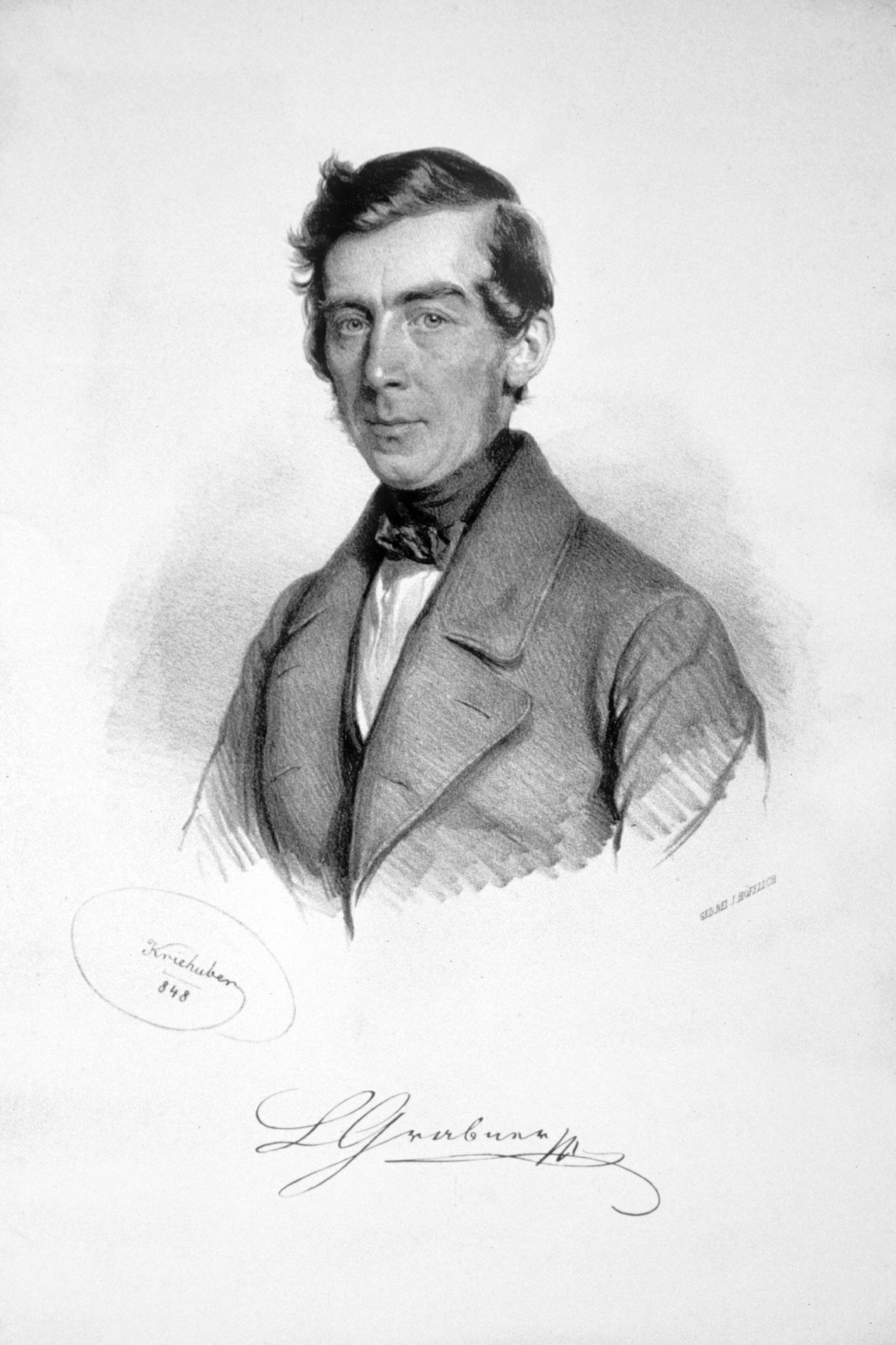 Leopold Grabner (1802-1864) Forstmann. Lithographie von Josef Kriehuber, 1848